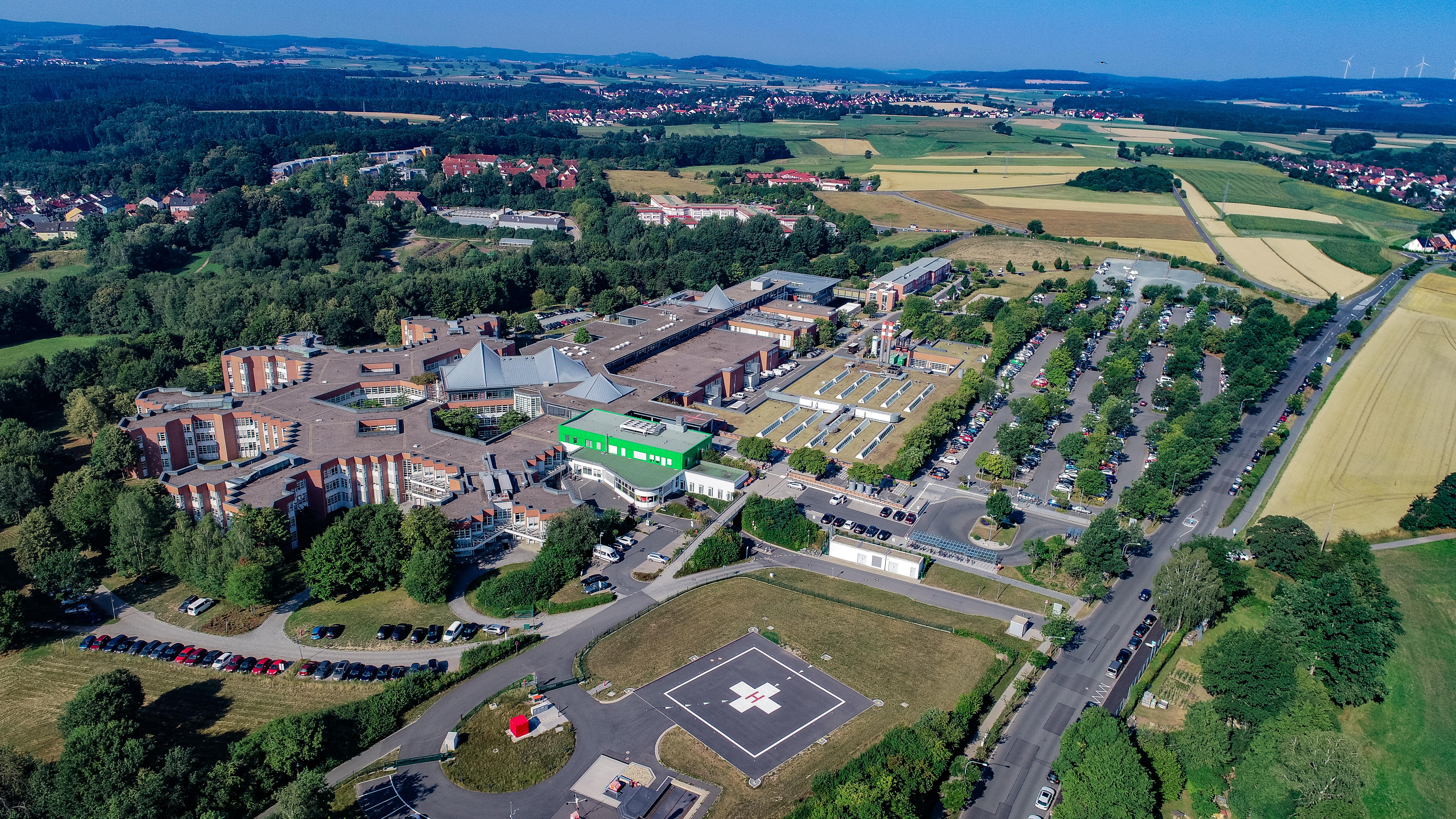 Das Klinikum Bayreutzh von oben.